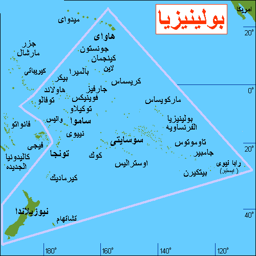 map Polynesia, Oceania